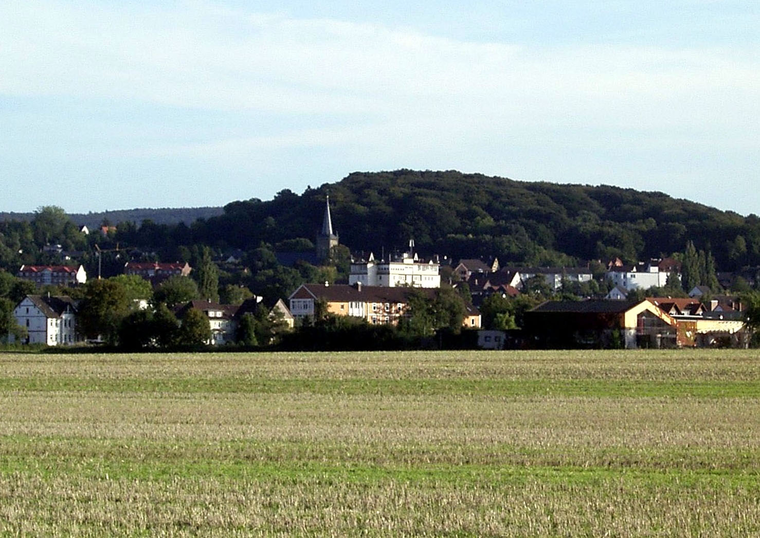 Bad Nenndorf am Deister Die Ortsmitte von Bad Nenndorf mit der St.-Godehardi-Kirche von Nordwesten gesehen. Das große weiße Gebäude in der Bildmitte ist das „Hochhaus“, eine architektonische Verirrung der sechziger Jahre. Im Hintergrund verdeckt der Galenberg die Sicht auf den Deister. Der bewaldete Hügel gehört zum 34 Hektar großen Kurpark von Bad Nenndorf.